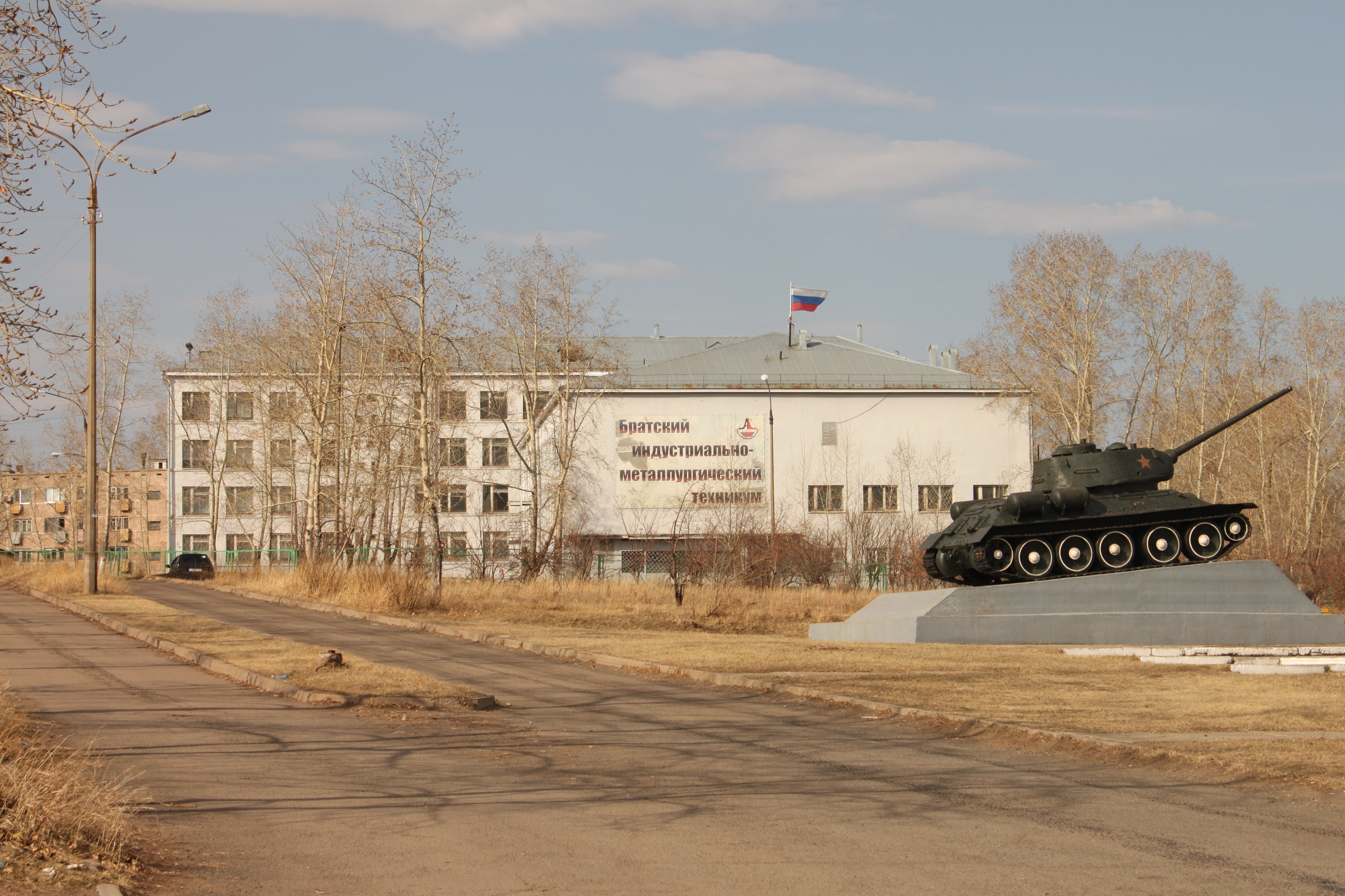 Братский индустриально-металлургический техникум (город Братск Иркутской области)